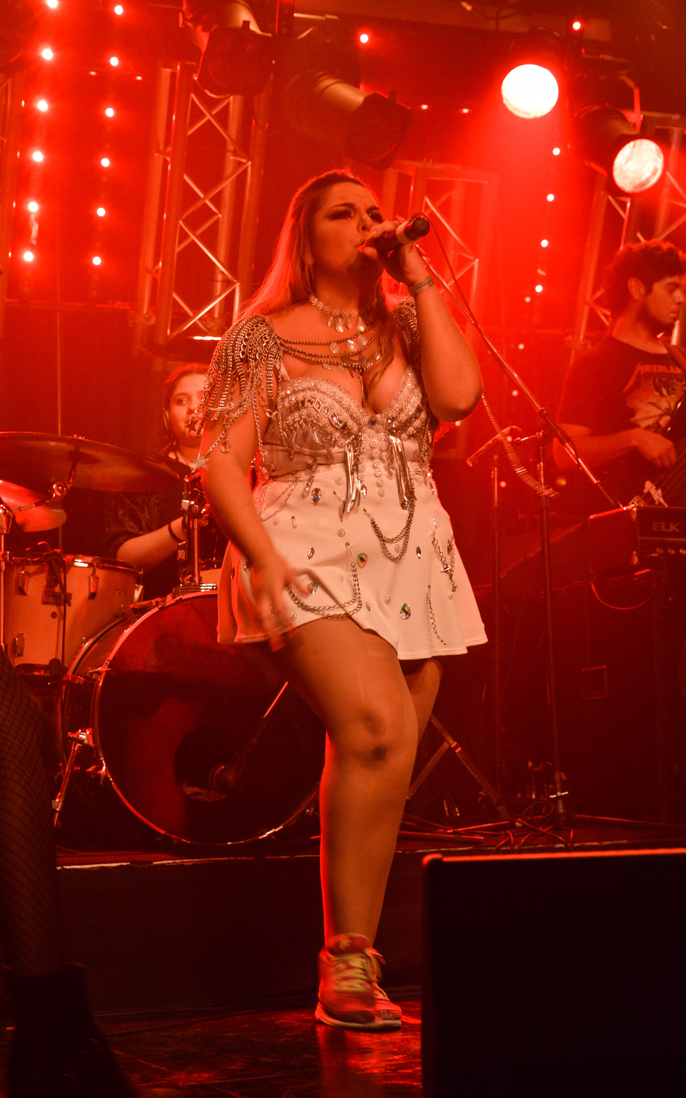 Richi Star en Vivo 2018 en La Trastienda